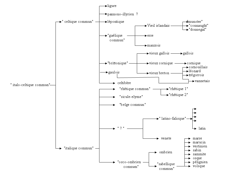 branche indo-europeenne italo-celtique